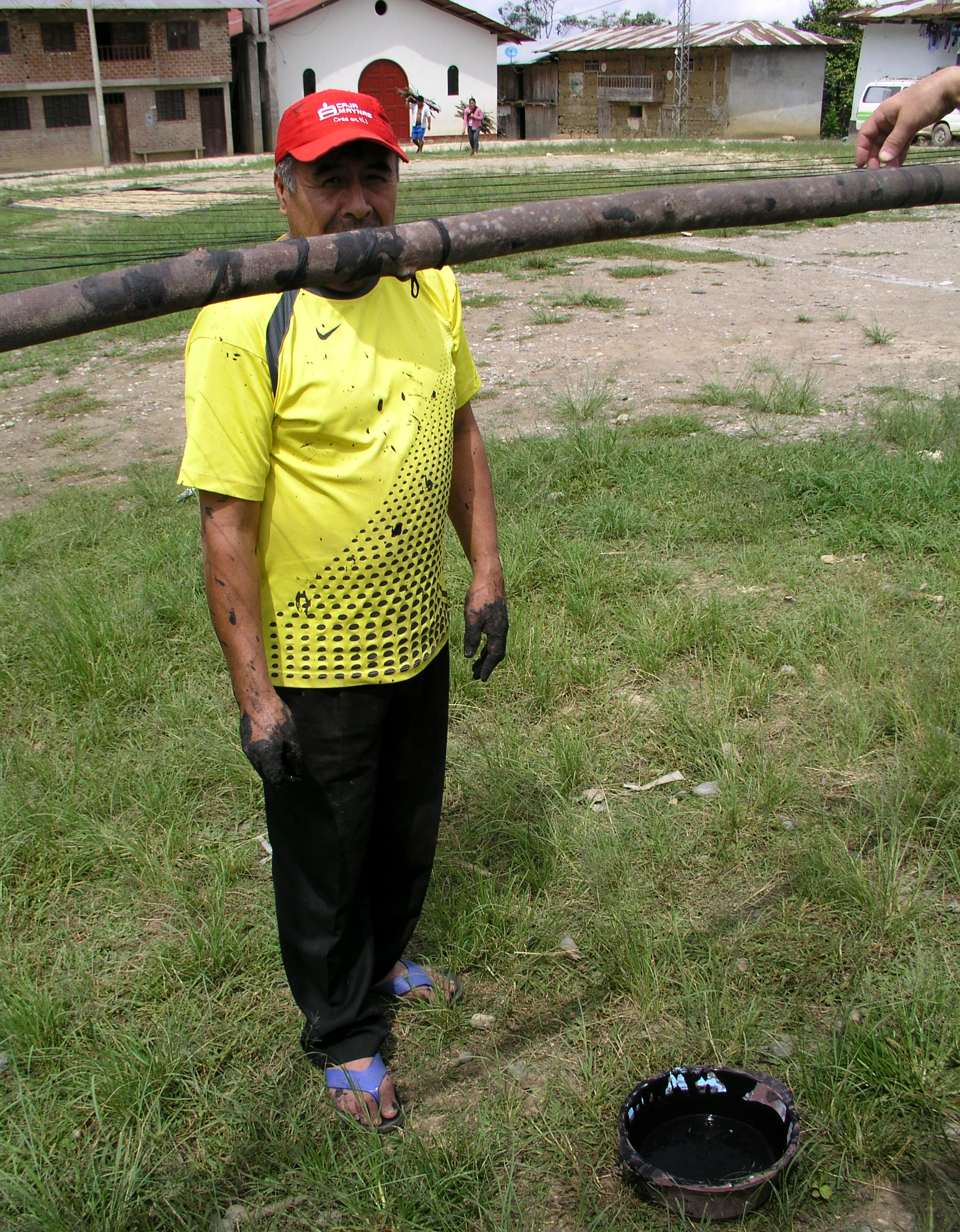 Pyrotechnicien enduisant des fils d'un mélange pyrotechnique, Vista Alegre, Yamon, Utcubamba, Amazonas, Pérou.